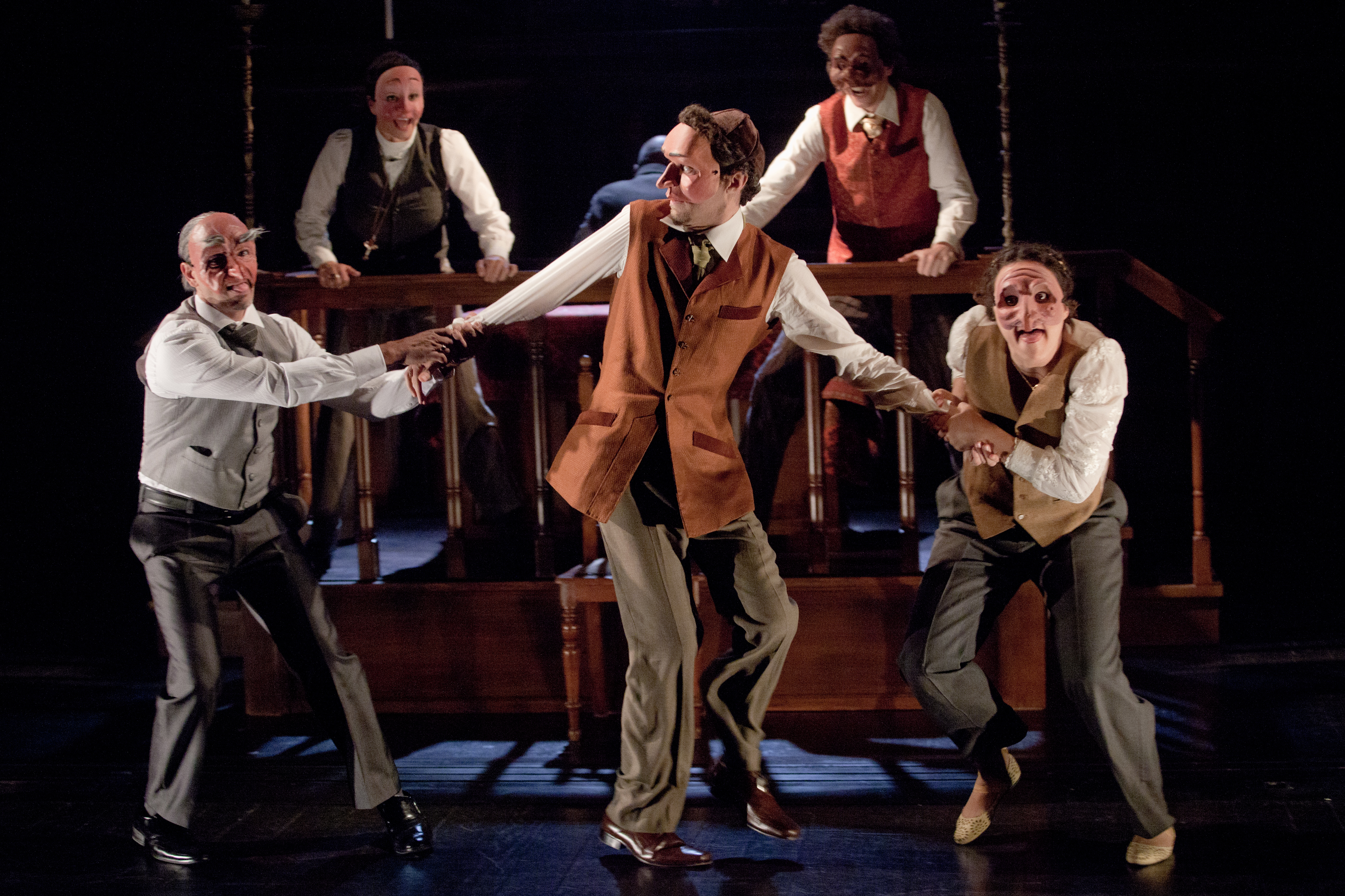 ההצגה "ירושלים החדשה" בבימויו של סיני פתר, תיאטרון החאן, 2012